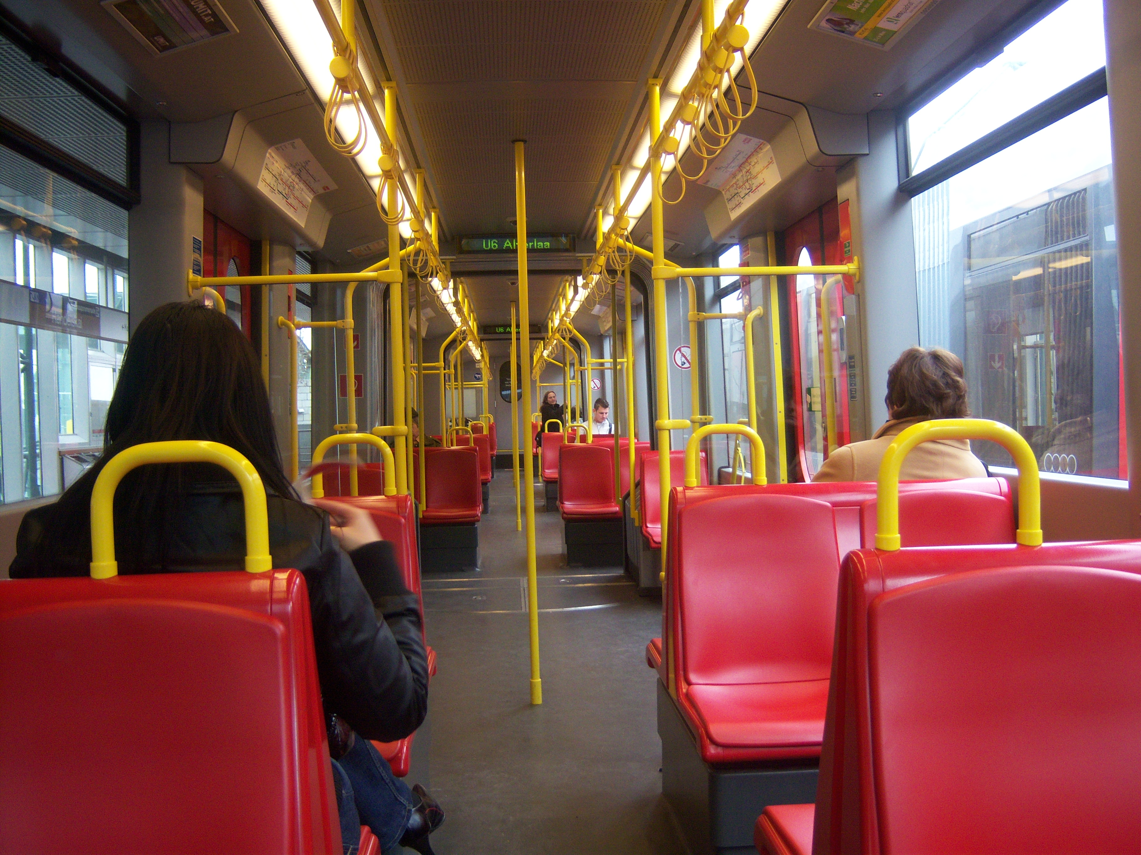 Innenraum eines Typ T1